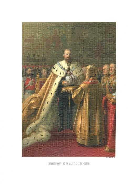 Одна из иллюстраций коронационного альбома Александра Третьего, изображающая императора